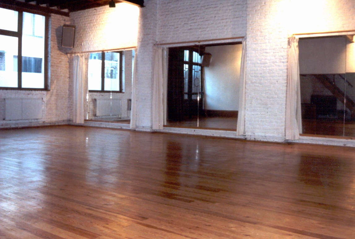 Budo College Belge